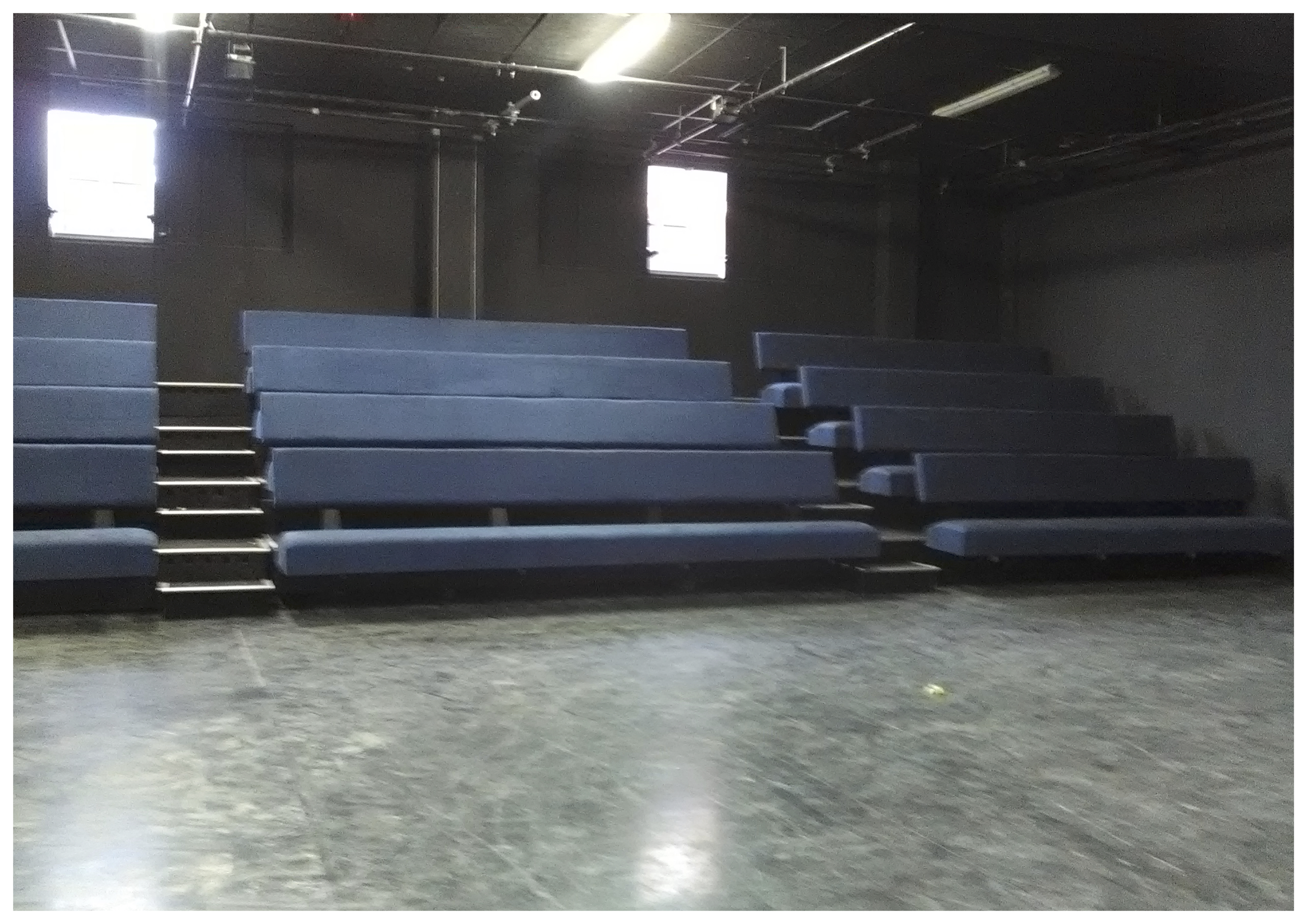 Plateau#02 - La Distillerie